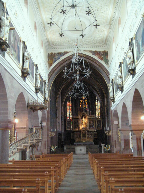 Stadtmünster Villingen, Innenansicht Blick Richtung Chor